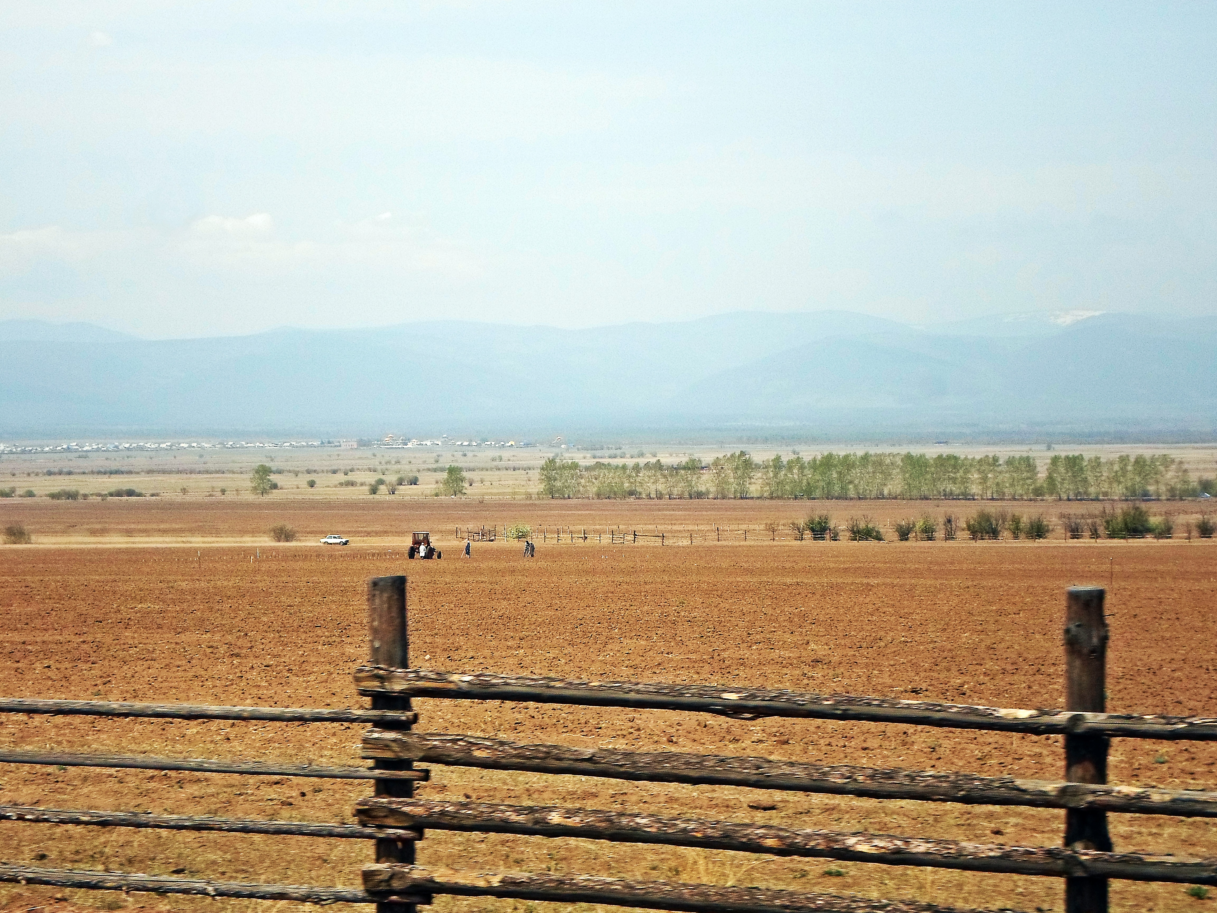 Долина реки Иволги. Бурятия. Май. Дымка от таёжных пожаров. Вдали - село Верхняя Иволга и Иволгинский дацан. Вид с Кяхтинского тракта.